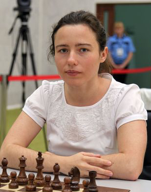 Евгения Овод, Суперфинал чемпионата России по шахматам 2015